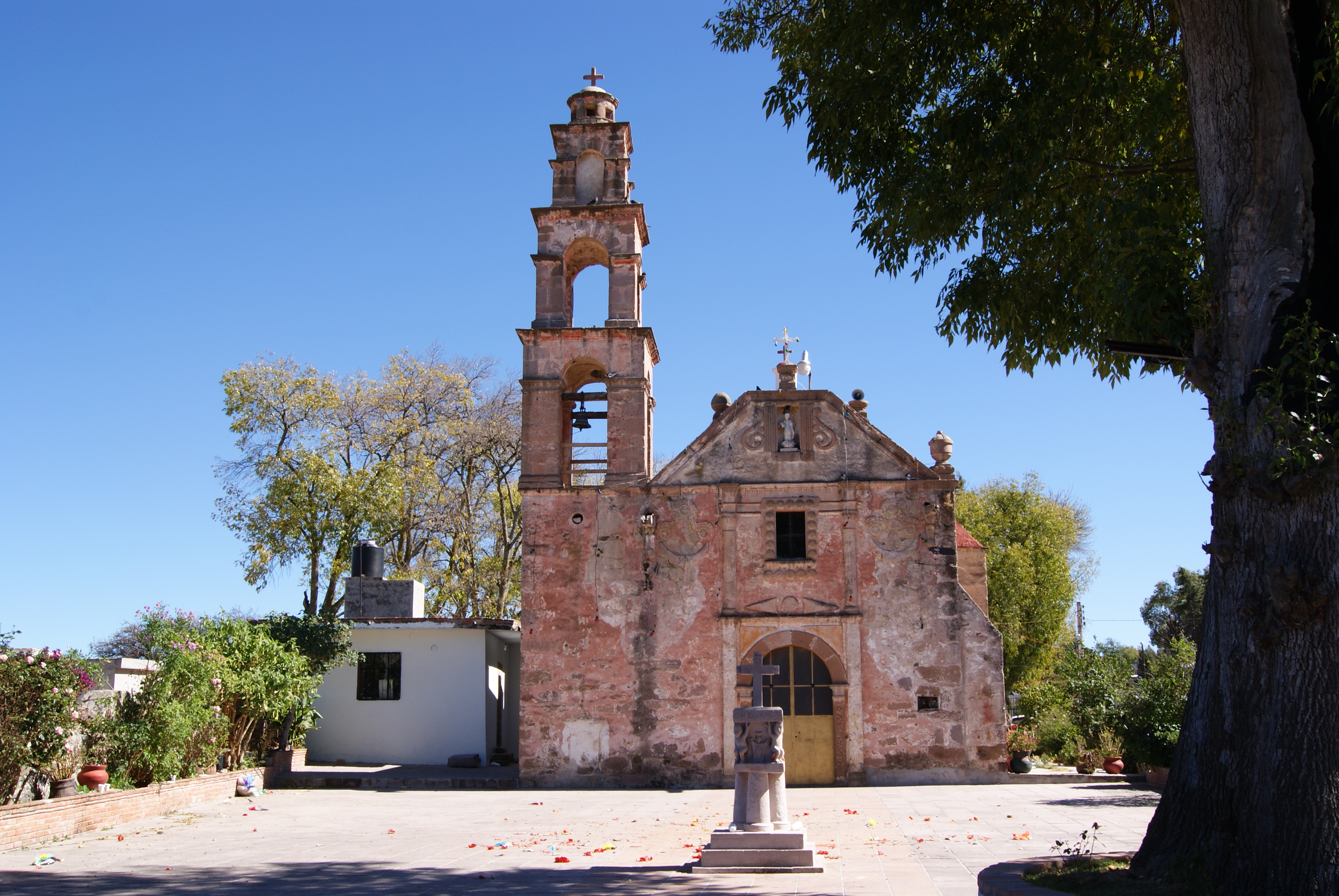 Atrium.